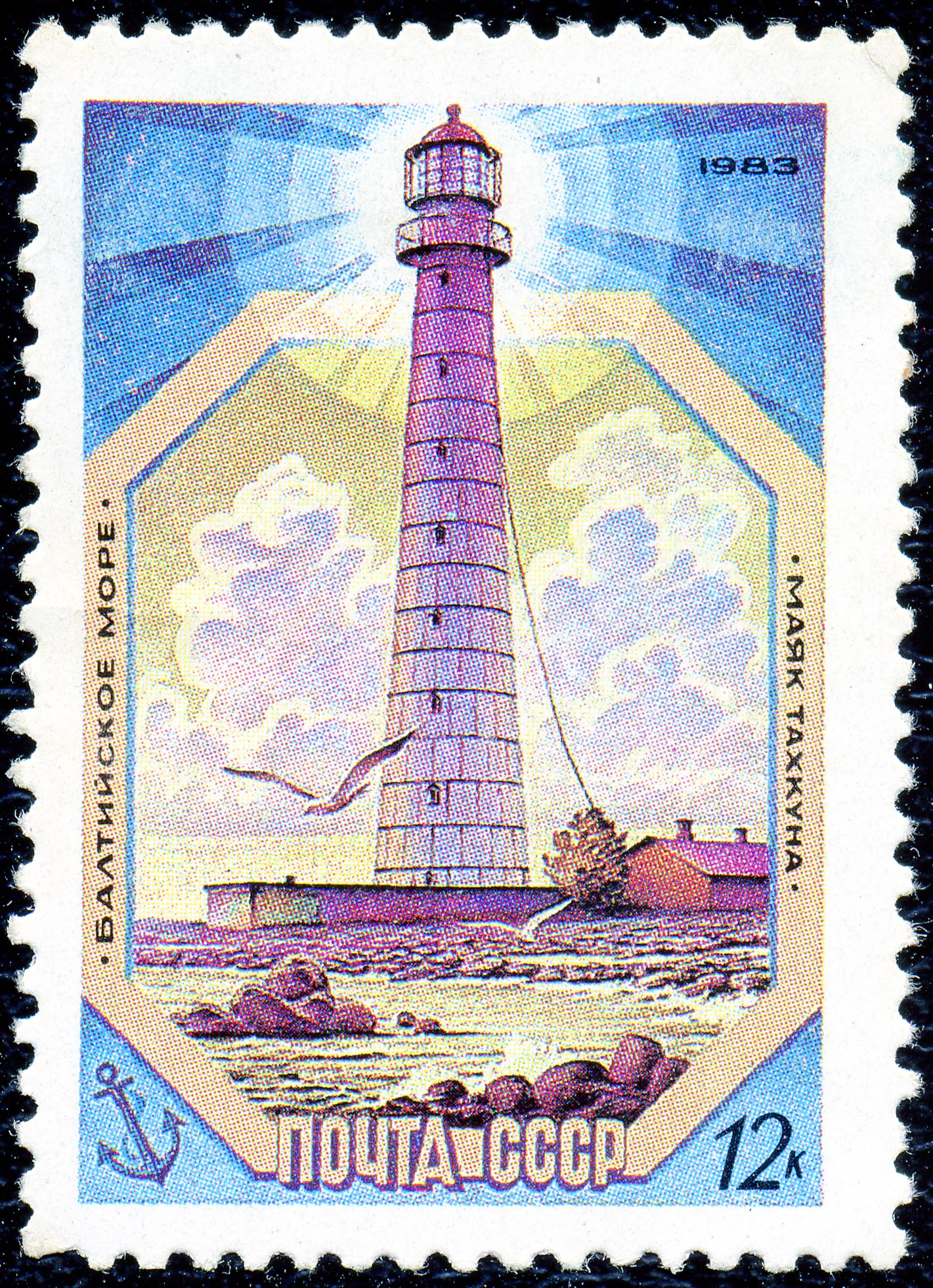 Почтовая марка СССР. 1983. Балтийское море. Маяк Такуна